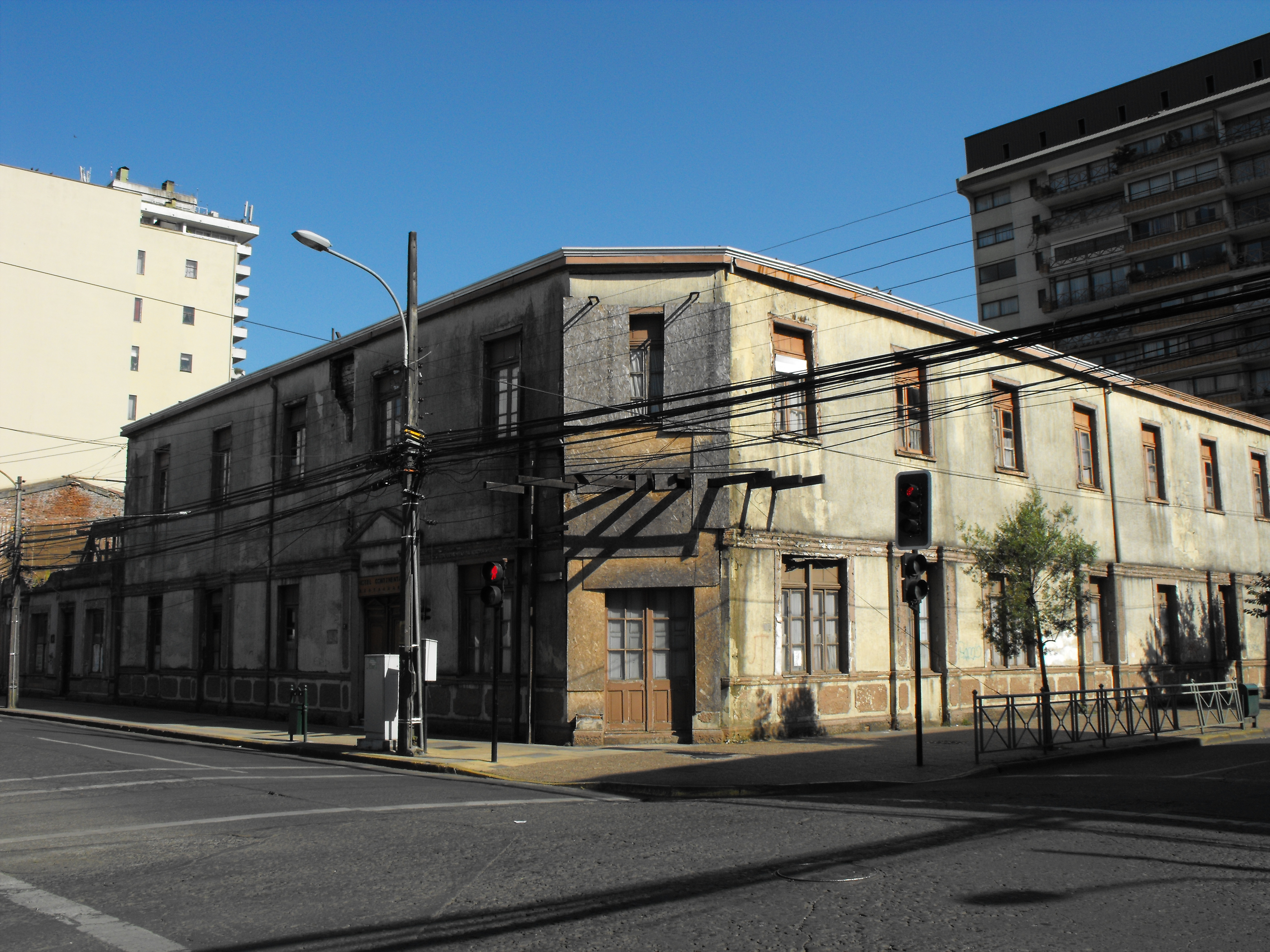 Hotel Continental, ubicado en el Sector Centro de la ciudad de Temuco, Chile. This is a photo of a national monument in Chile: 2193